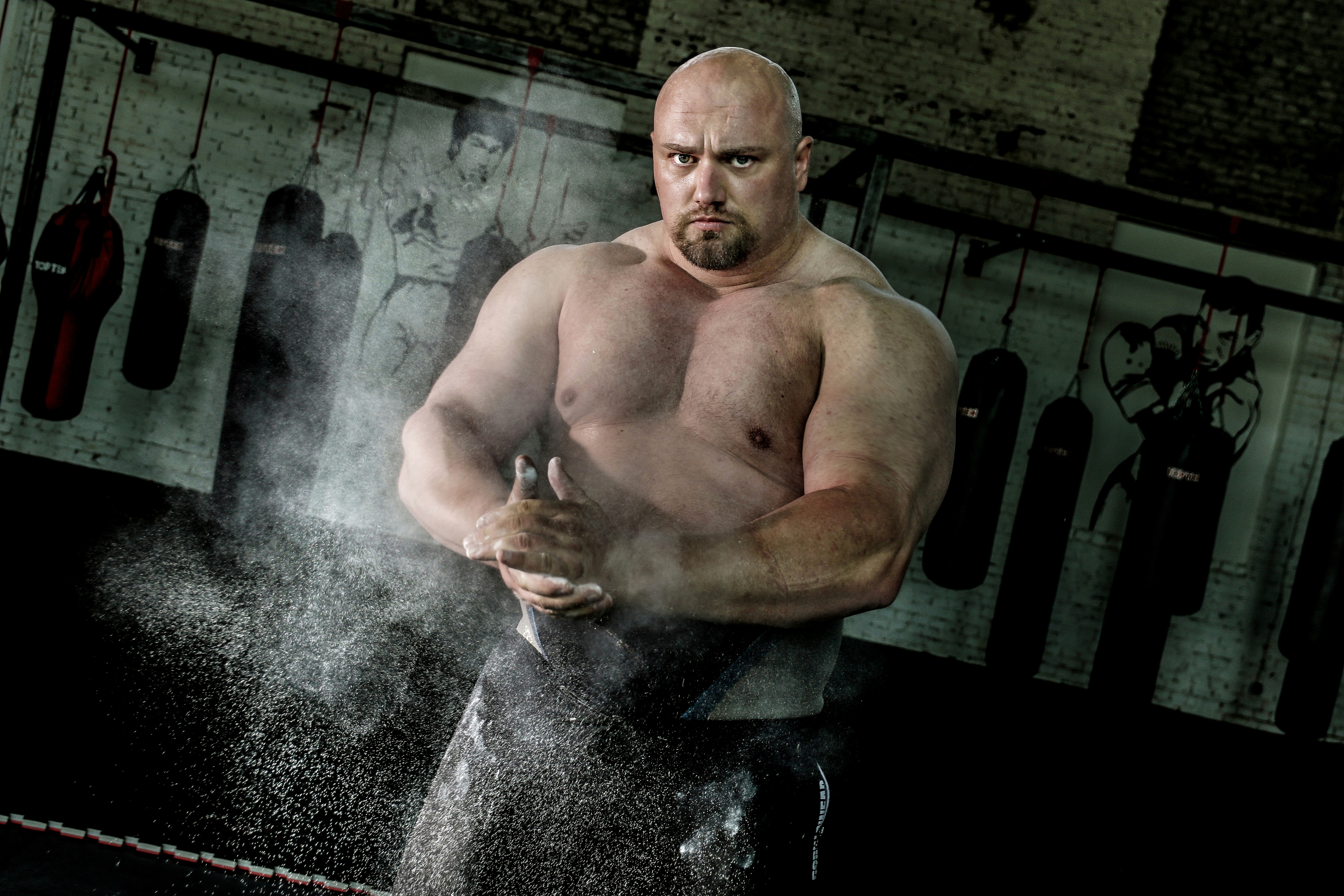 Raffael im Extreme Fight Club Gießen